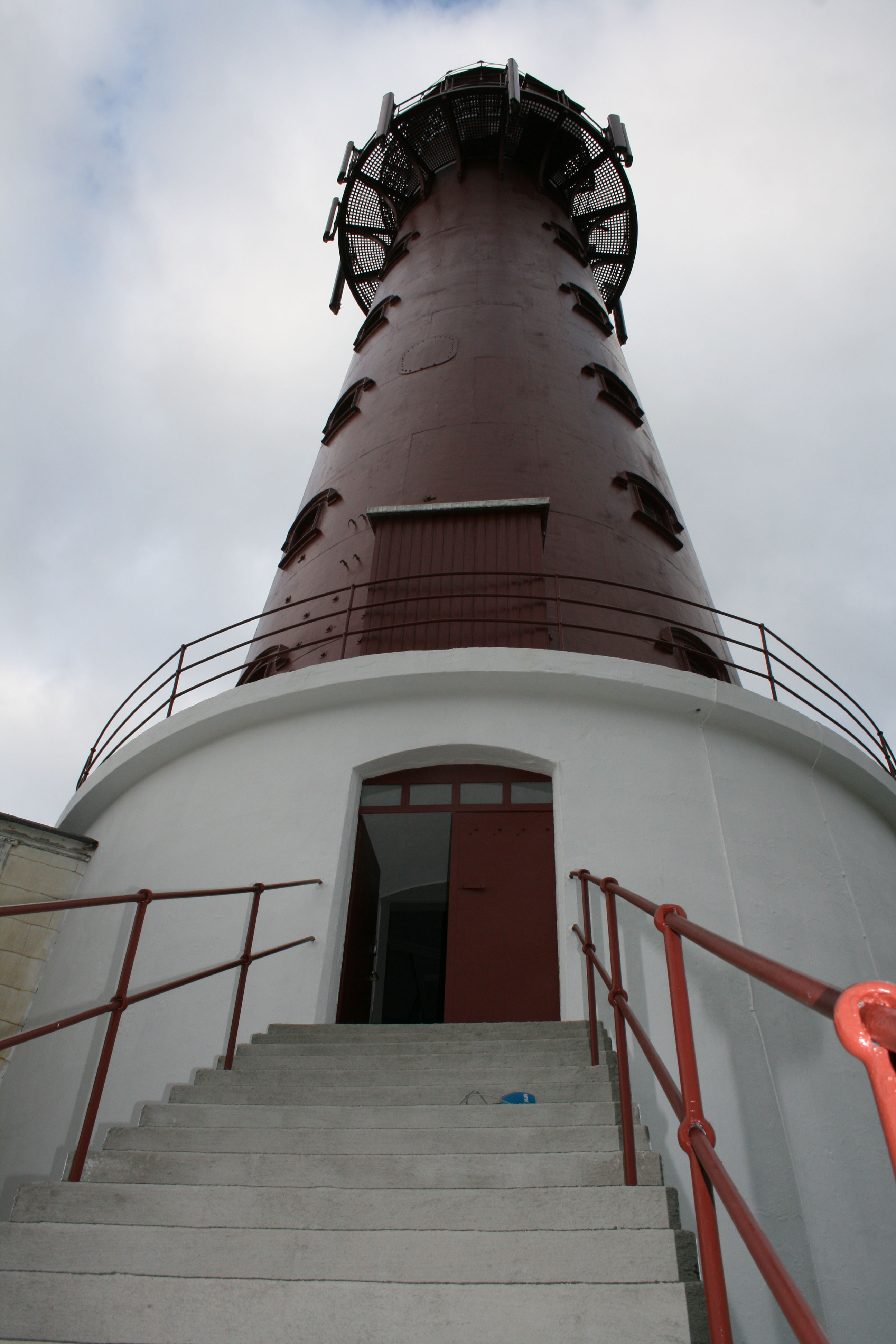 Lengst ytterst ut mot havet ligger Skomvær fyr